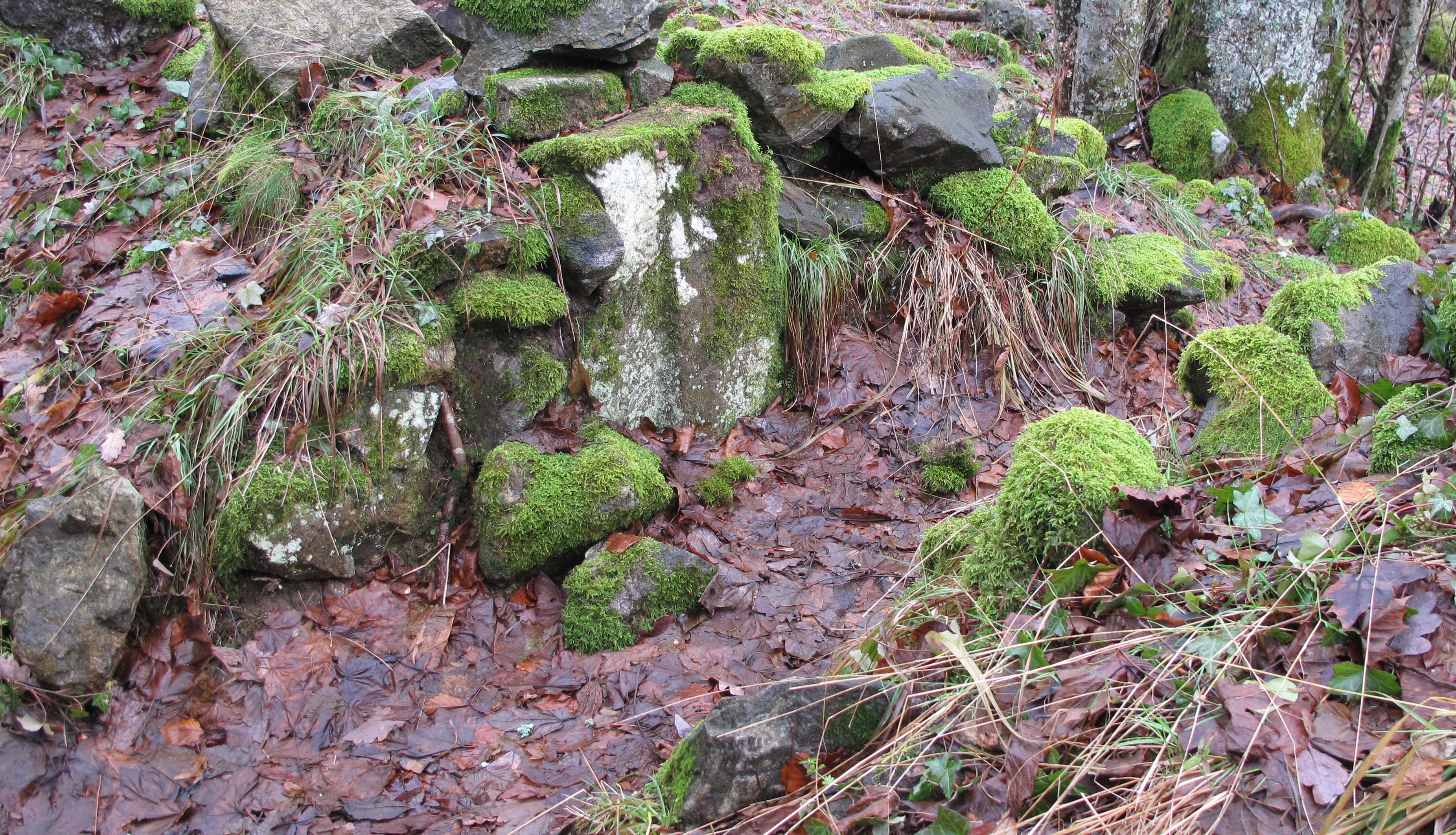 Türgewänderest im Mauergeviert.